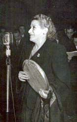 L'attrice italo-cilena Jole Fano nei tardi anni quaranta